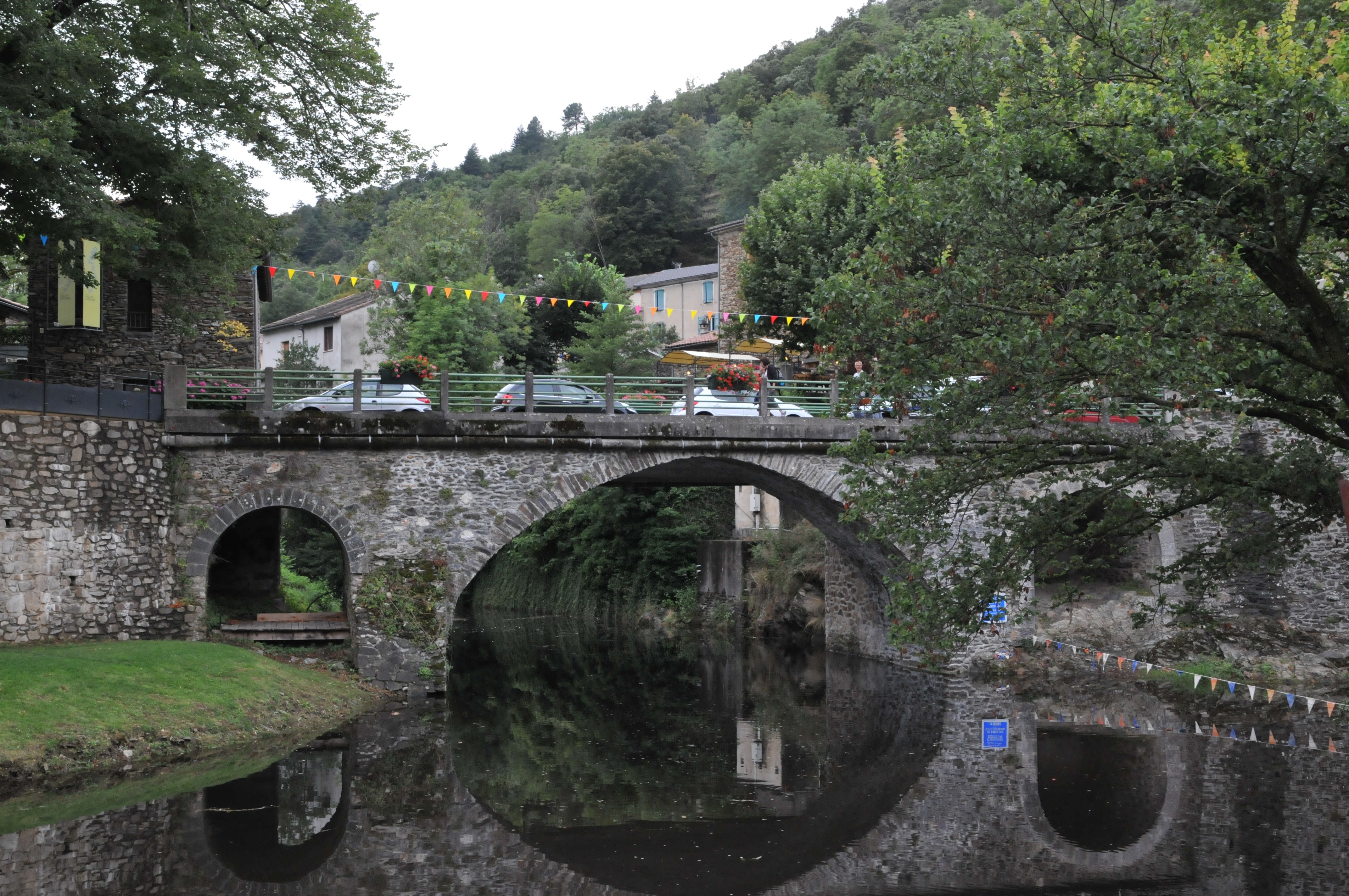 D 193, Les Plantiers, Gard, France